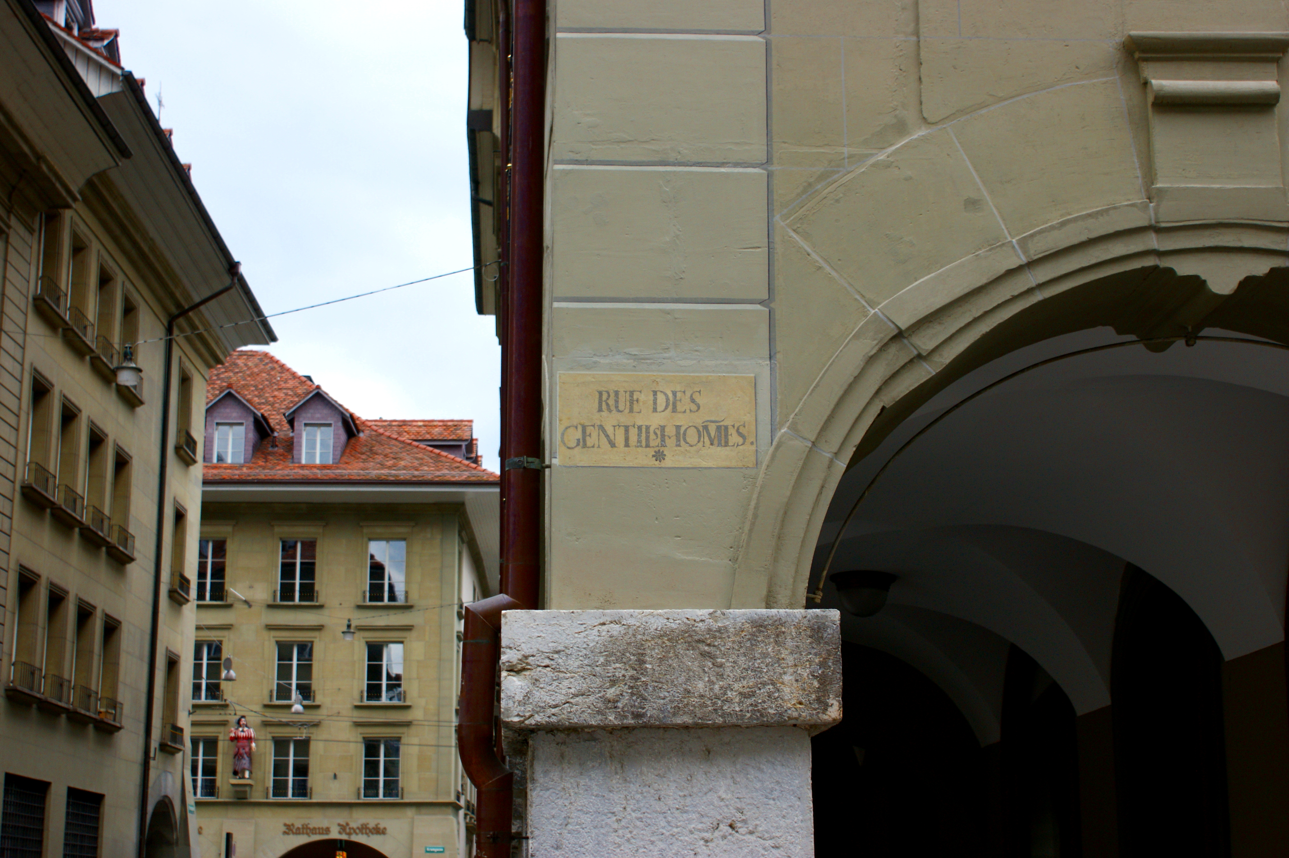 Strassenschild "Rue des Gentils Hommes" - deutsch: Junkerngasse - aus der Zeit der französischen Besatzung 1798-1803 durch Napoleon am Haus Junkerngasse 58, Ecke Kreuzgasse 3